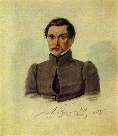 Акварельный портрет декабриста И. И. Пущина, написанный Н. А. Бестужевым в Сибири в 1837 г.